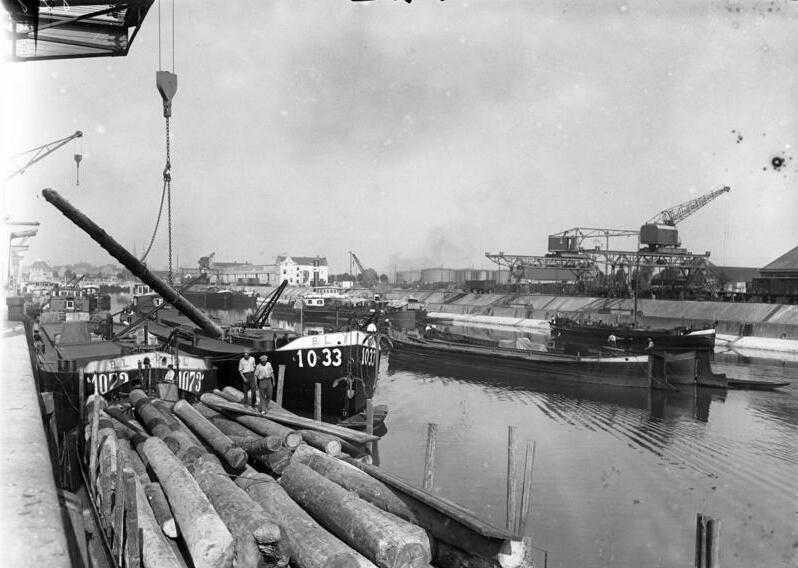 Der Hafen von Regensburg an der Donau.